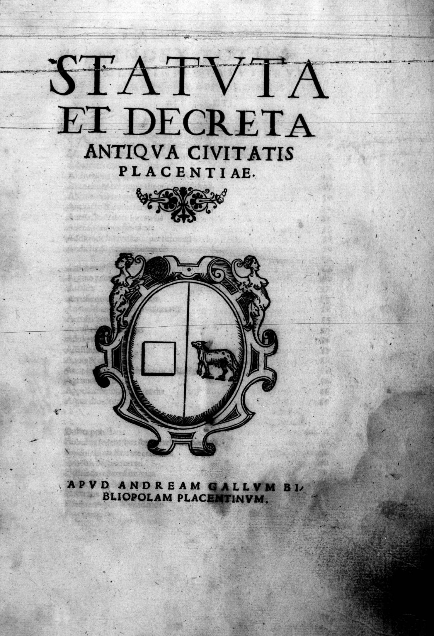 Frontespizio